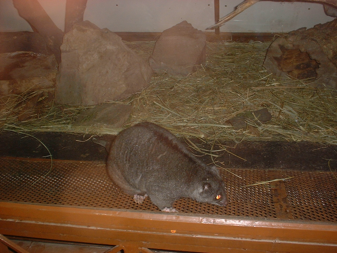 Grondkoeskoes (Phalanger gymnotis) in dierentuin van Boedapest (2005).